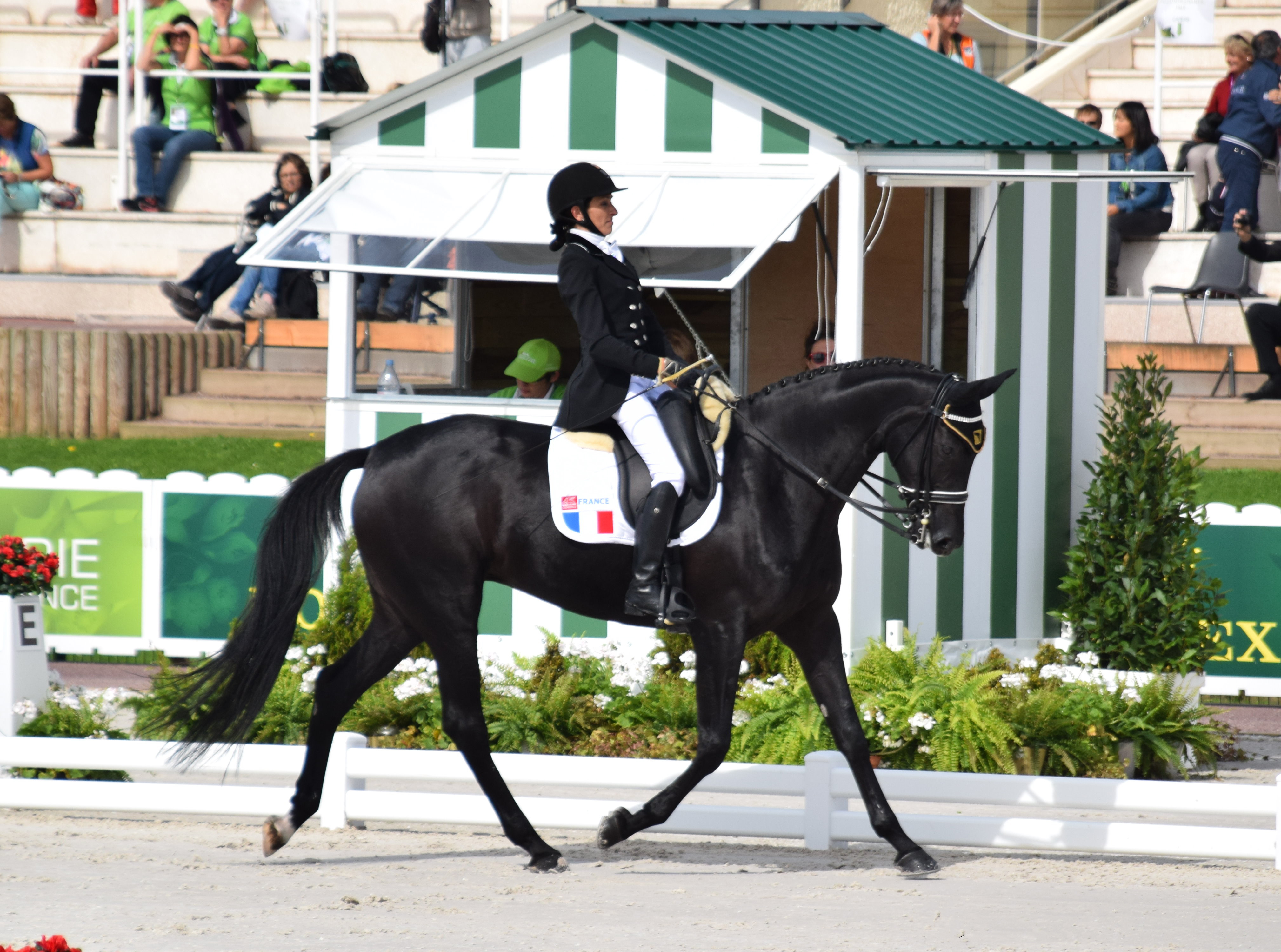 JEM 2014 : Anne-Frédérique Royon et J'adore en dressage para-équestre (Grade Ib)